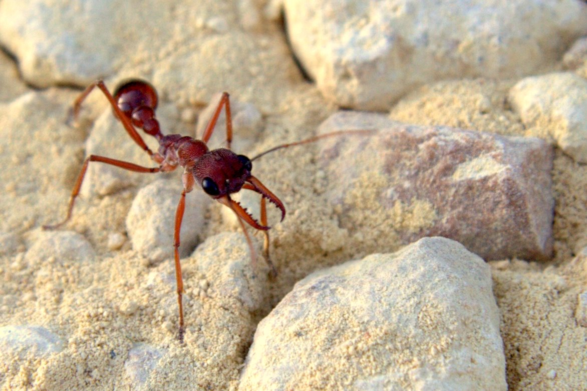 Myrmecia sp., Great Ocean Road, Victoria, Australia